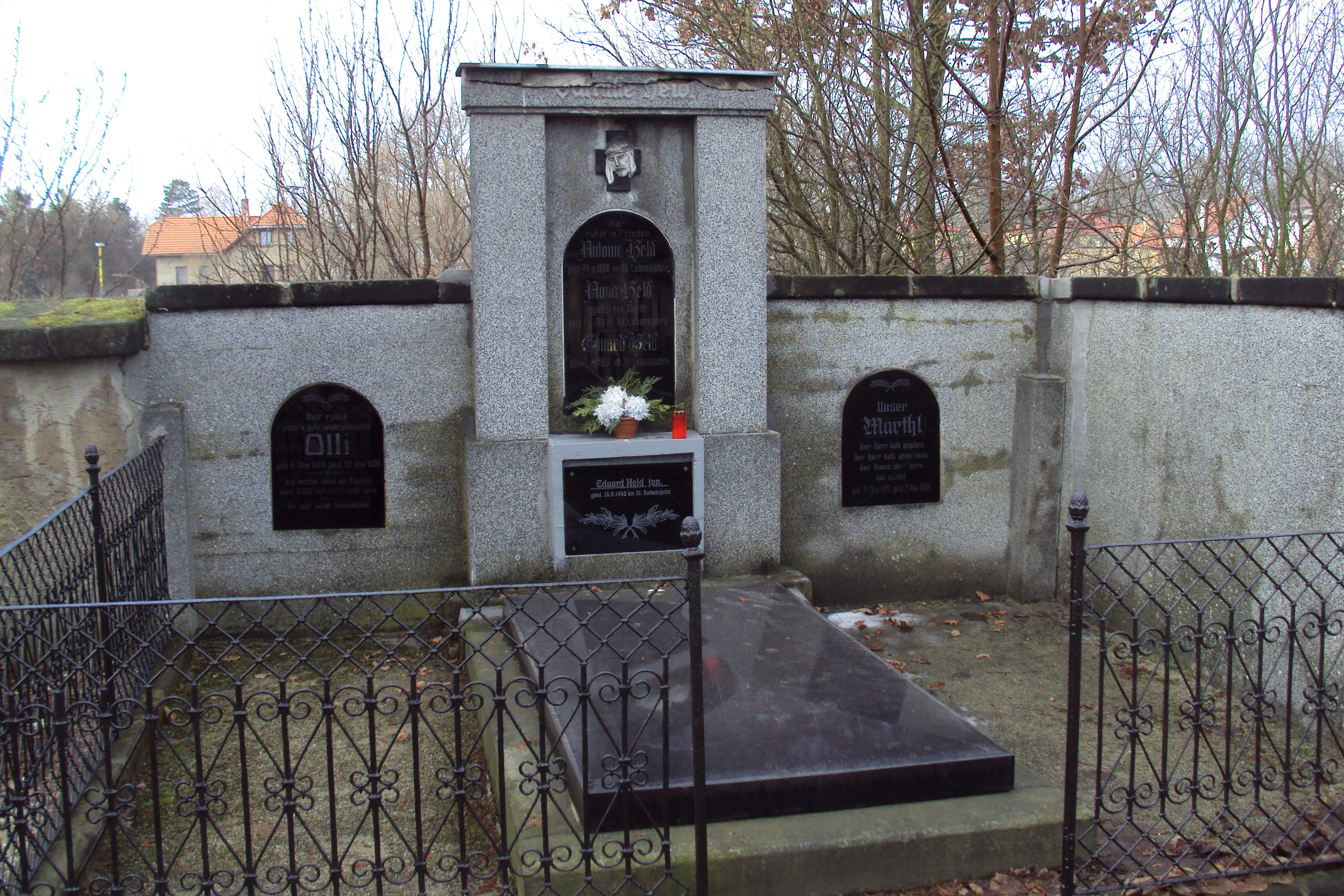 Česky: Rodinný hrob Eduarda Helda v Zákupech